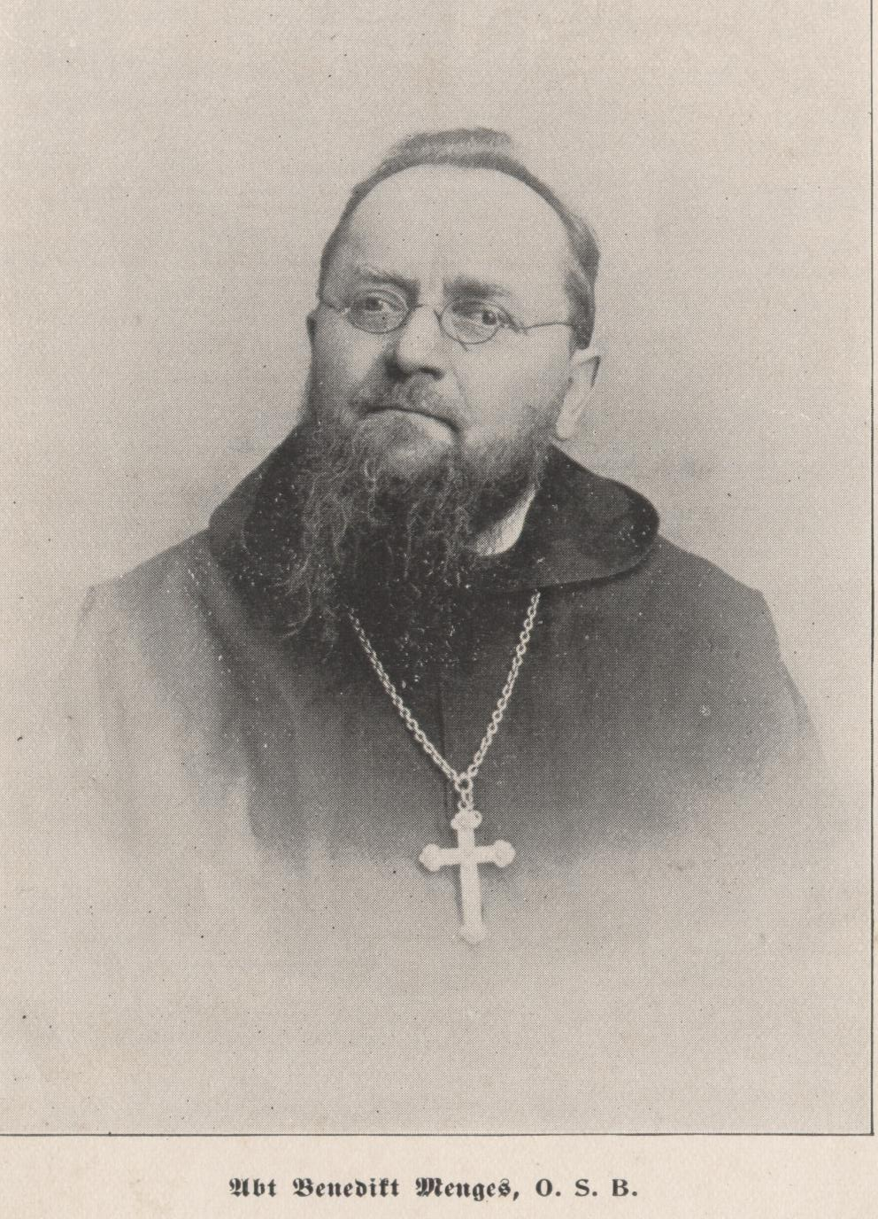 Benediktinerabt Benedikt Menges, aus Obermohr, Pfalz, Cullman Alabama